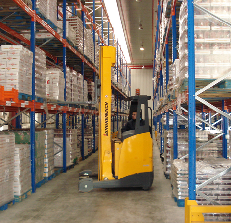 Interior de los almacenes de Cayco